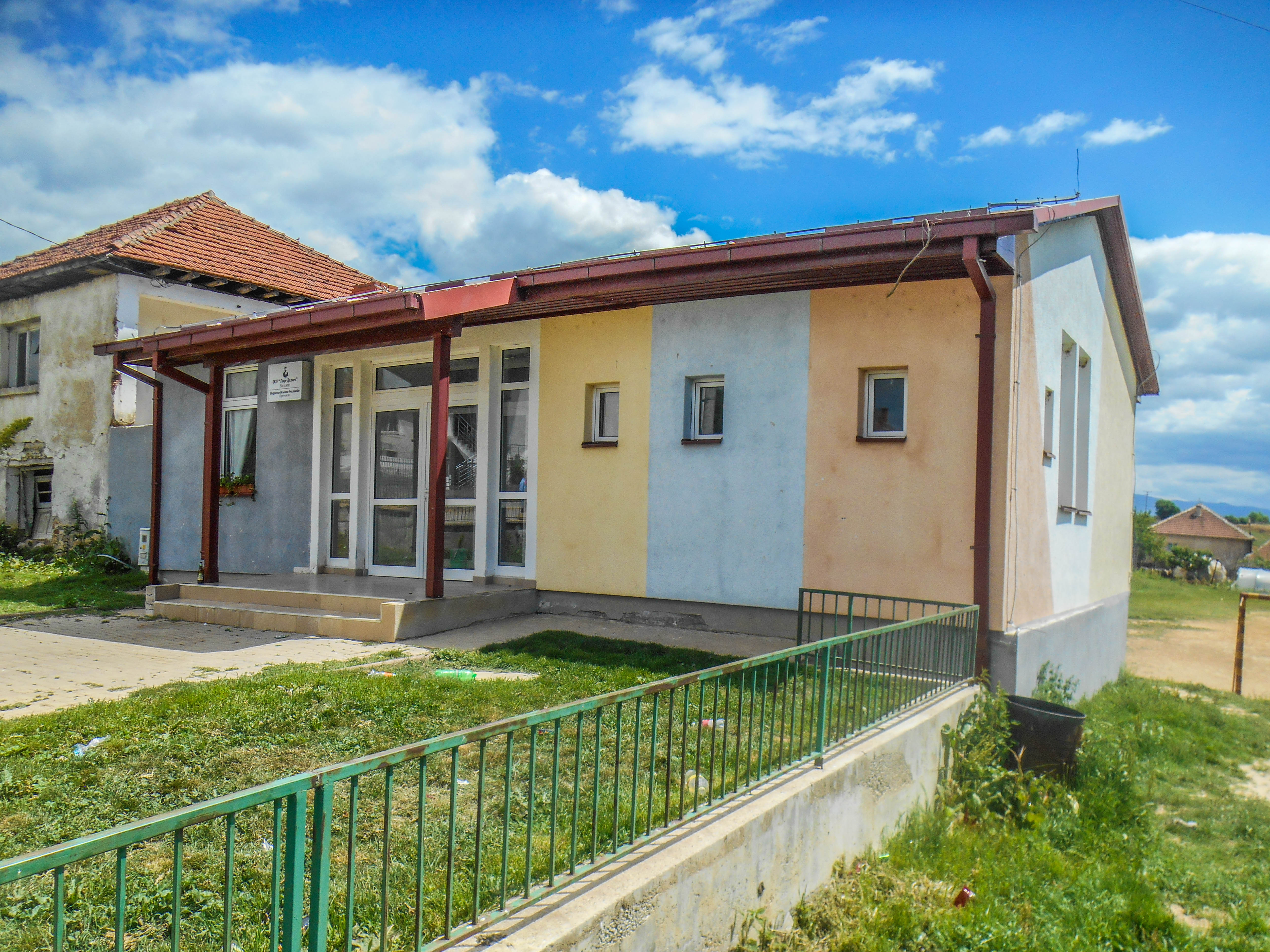 Основно училиште „Гоце Делчев“ - Едрениково